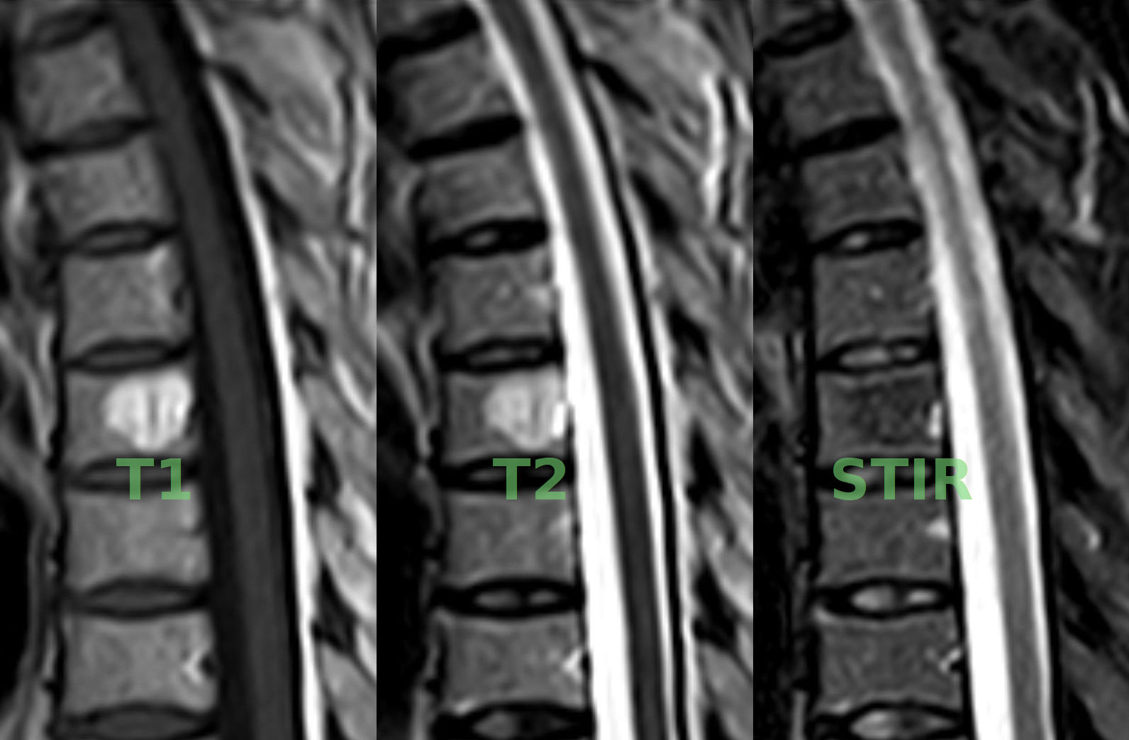 Typisches Wirbelkörperhämangiom in der Magnetresonanztomographie sagittal (von links nach rechts T1, T2 und STIR): Hell in T1 und T2 (Fett) und entsprechend dunkel in der fettgesättigten STIR-Sequenz. Der kleine in T1 dunkle, in T2 helle Strich am dorsalen Rand des Hämangioms entspricht einer Vene (siehe auch die anderen Wirbel).